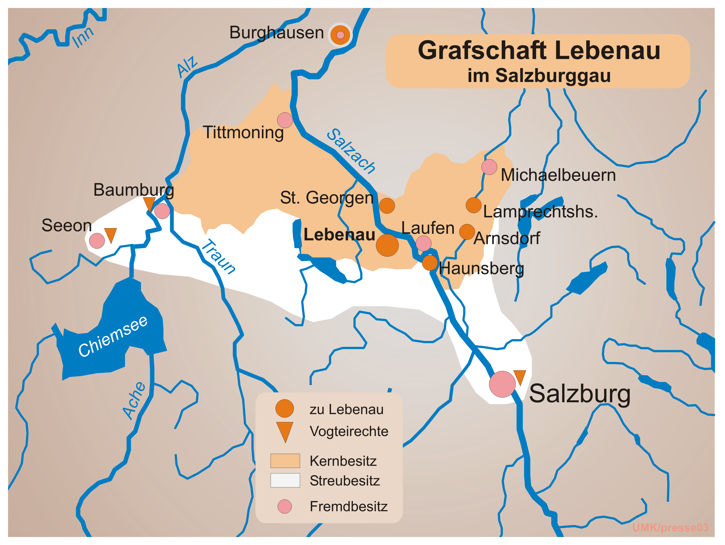 Grafschaft Lebenau im bayerisch-salzburgischen Raum (Salzburggau)